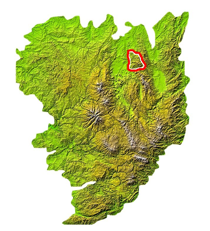 Situation de la montagne boubonnaise sur la carte du massi cental